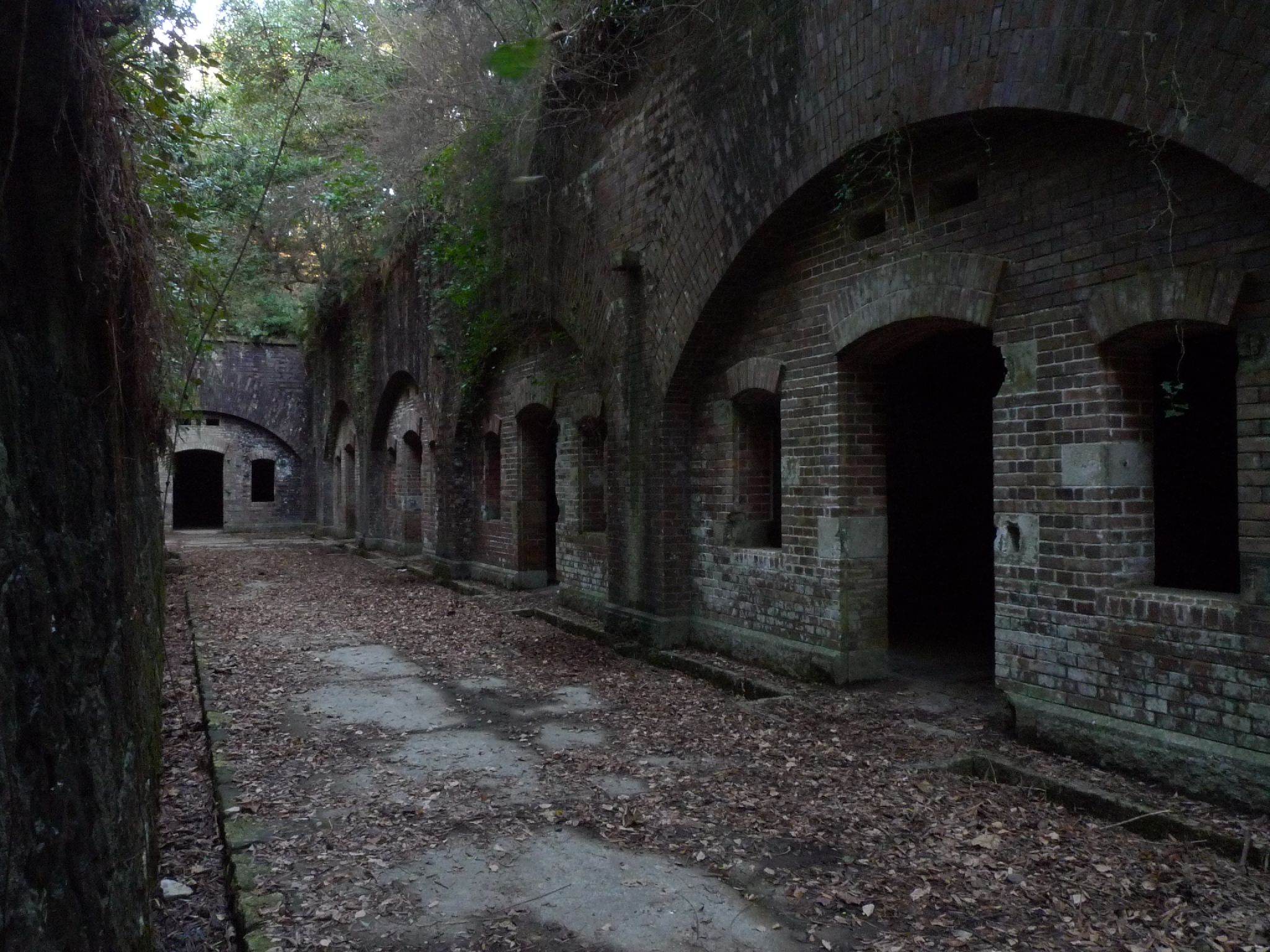 和歌山県和歌山市友ヶ島